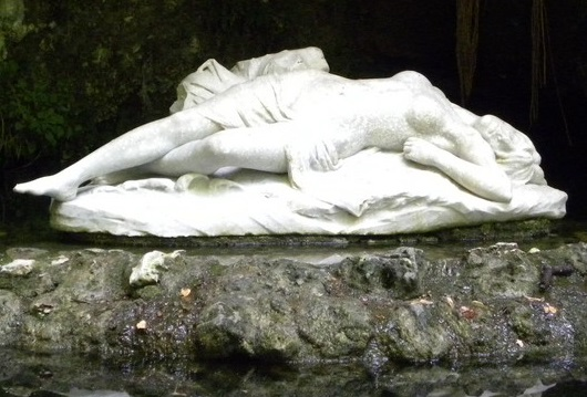 Fleurette de Nérac, jeune maîtresse du roi Henri IV. Statue de Daniel Campagne, réalisée en 1896, exposée au parc de la Garenne, dans la commune de Nérac.